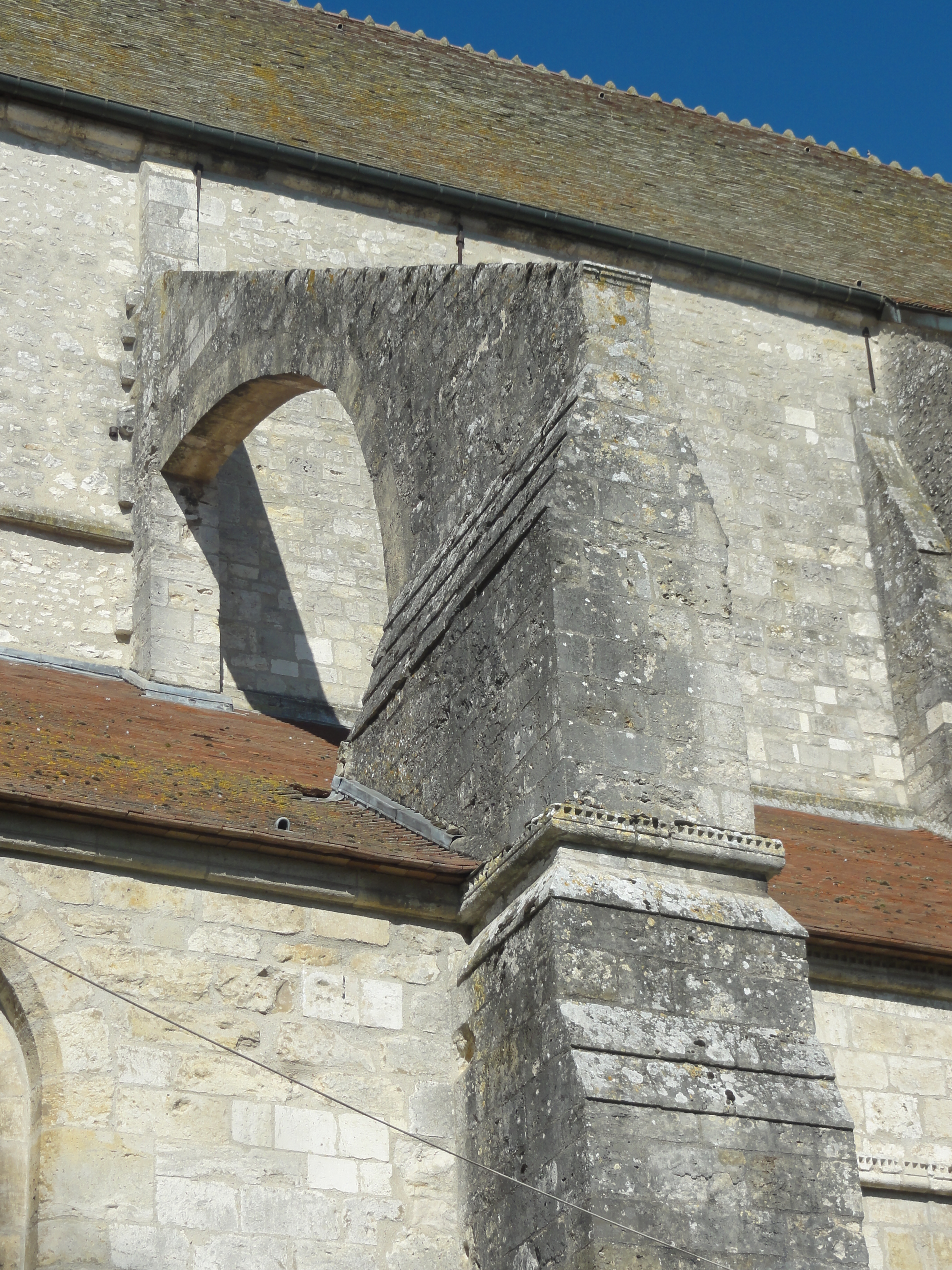 Dernier arc-boutant d'origine, entre la 3e et la 4e travée du sud.